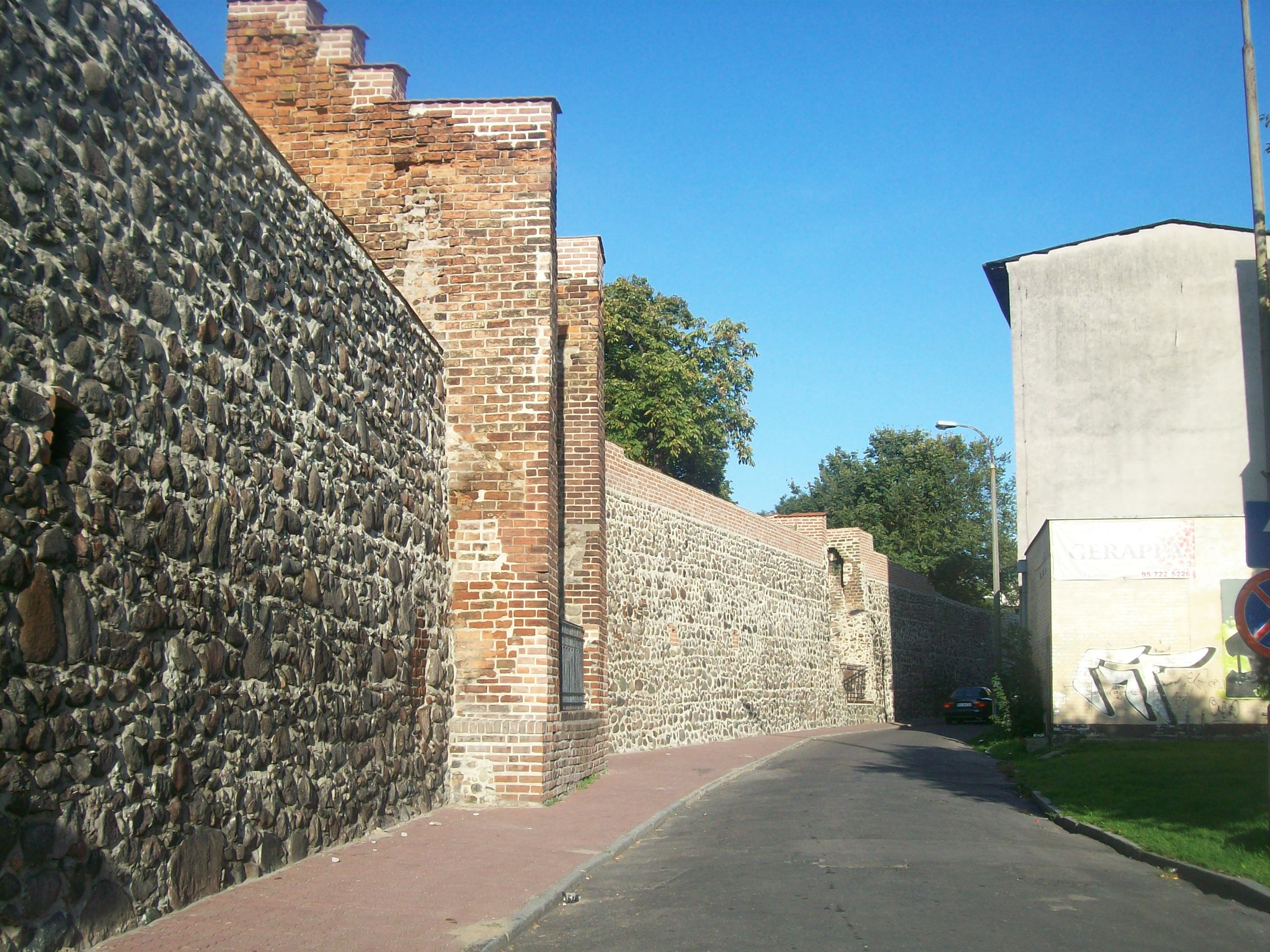 Gorzów Wielkopolski - mury obronne